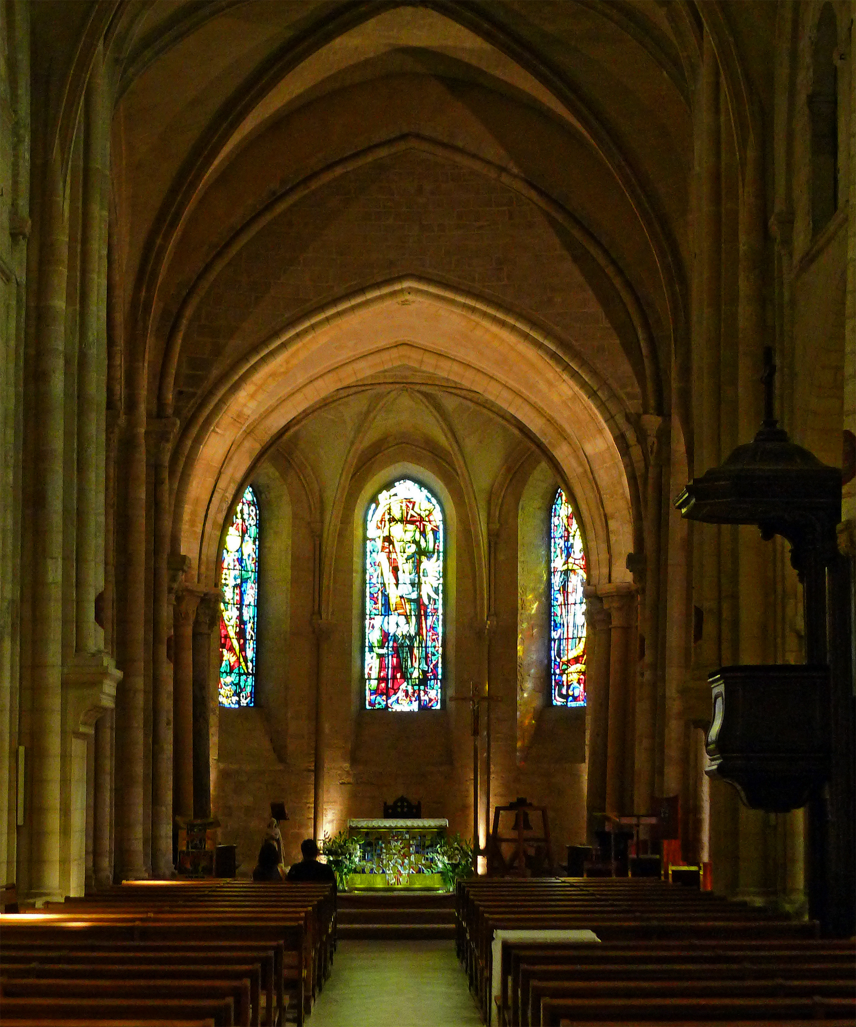 Église Saint-Pierre de Montmartre (nef et choeur) - Paris XVIII